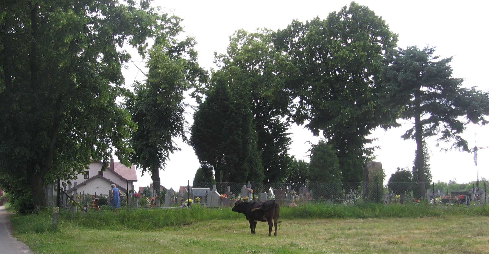 Wrocław, Poland - settlement Widawa: cemetery